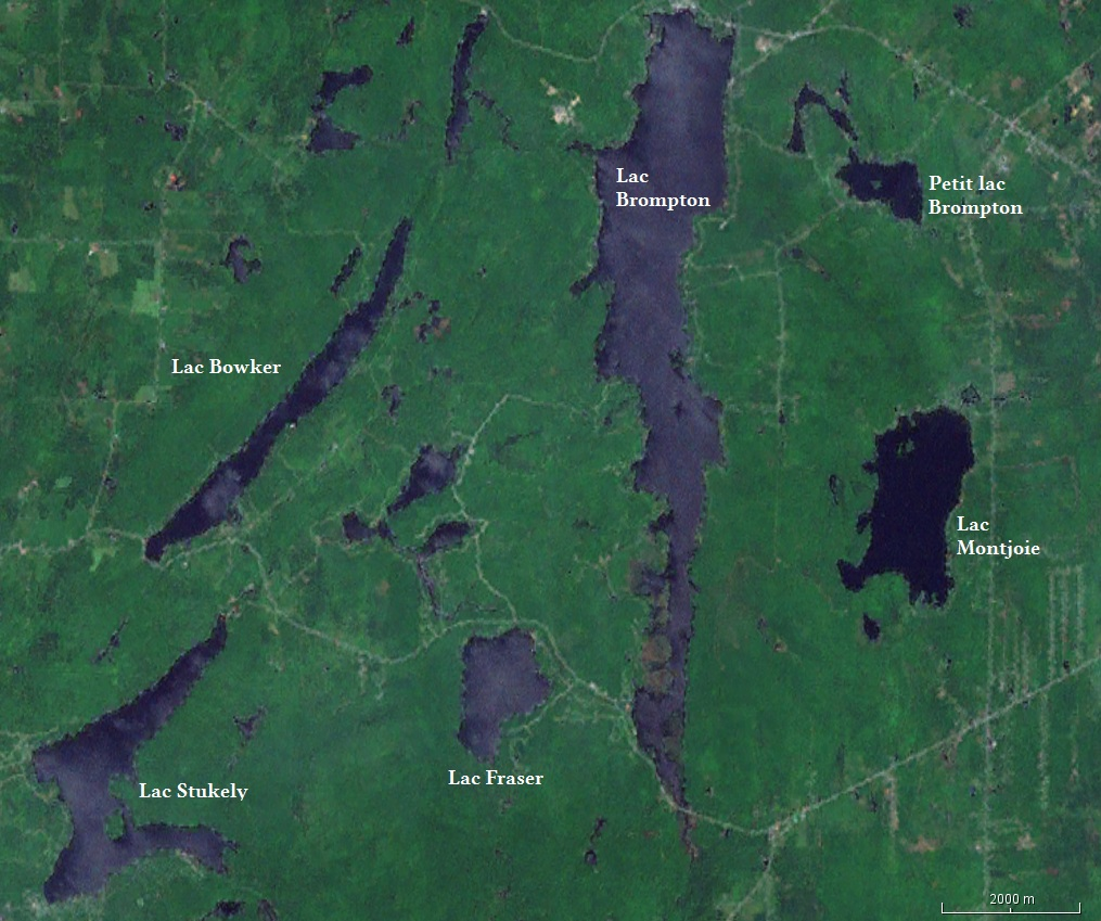 Lacs près du mont Orford : lac Bowker, lac Stukely, lac Fraser, lac Brompton, petit lac Brompton et lac Montjoie